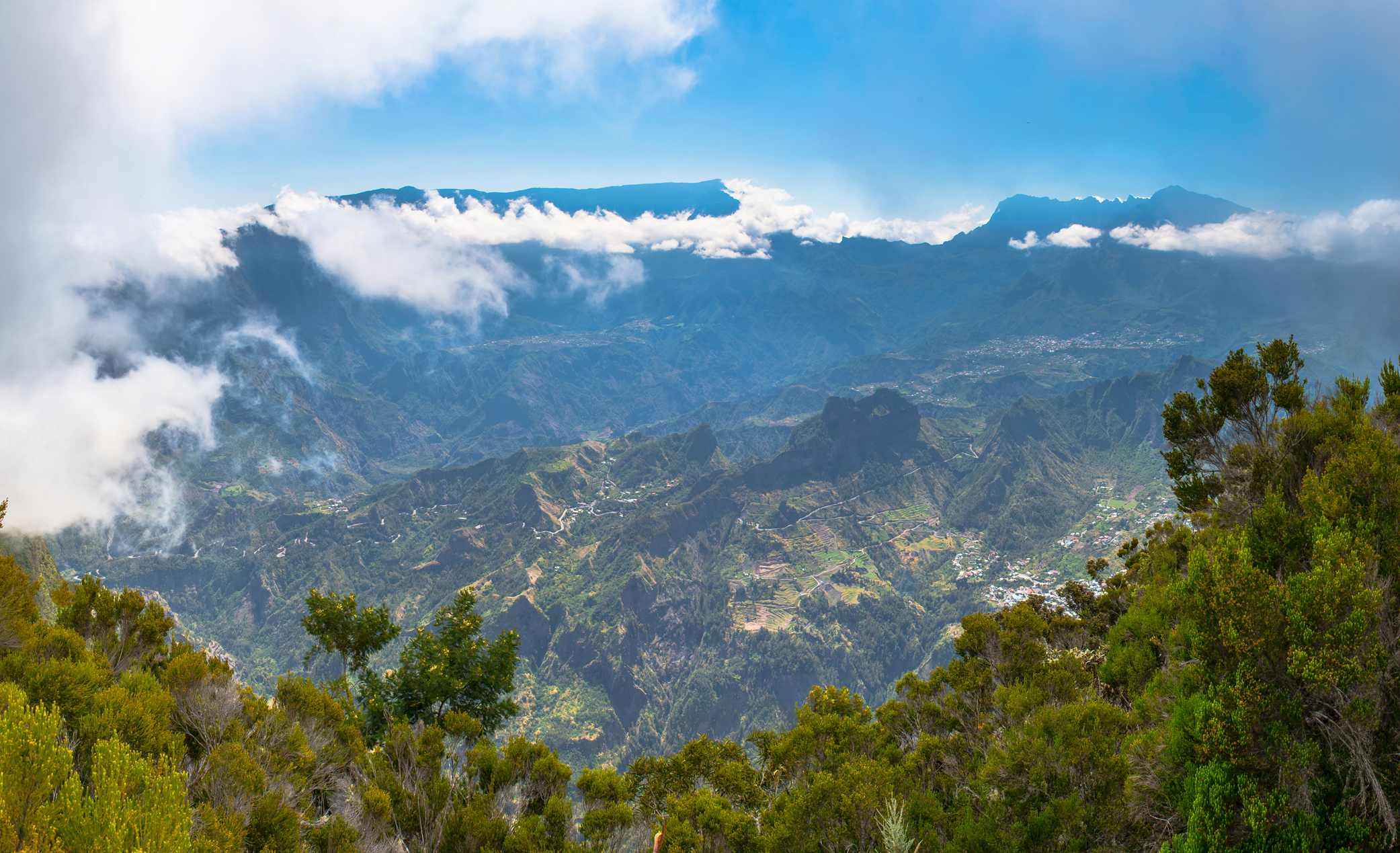 Vue sur le cirque de Cilaos au point de vue du Dimitile